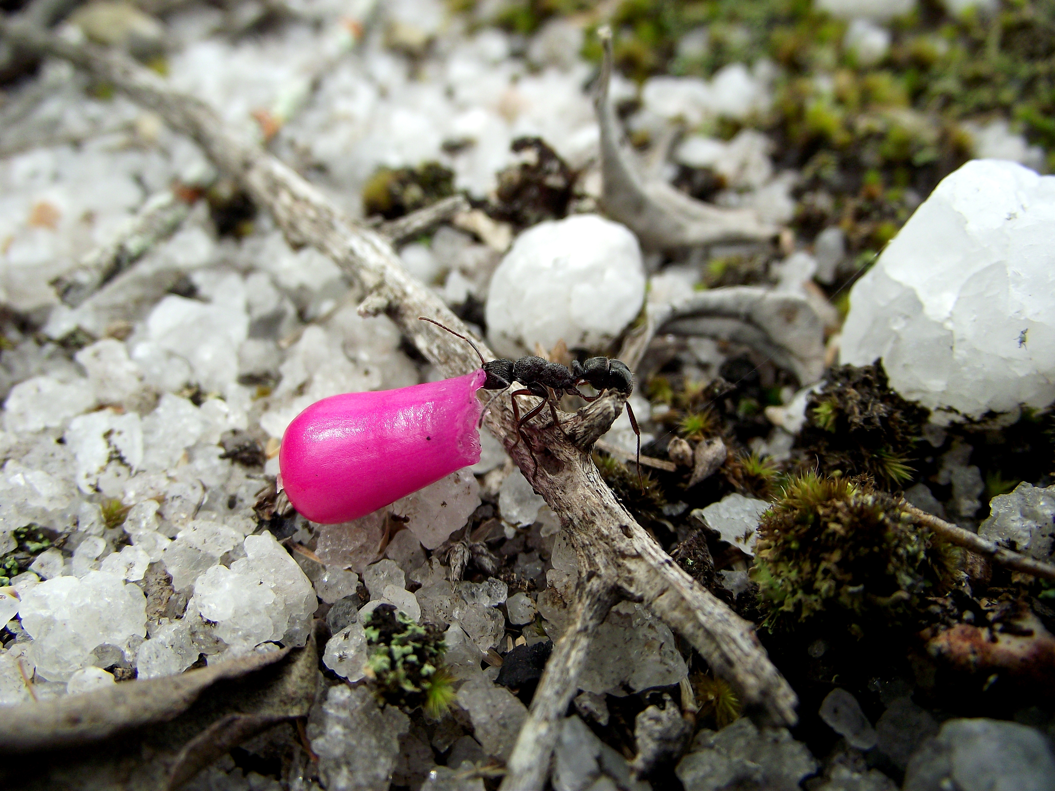 Mimercoria no fruto do M. conoideus